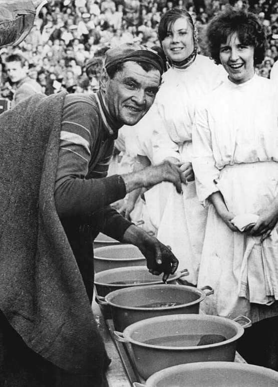 Ion Cosma wer erfrischt sich nicht gern in einer solch netten Umgebung.